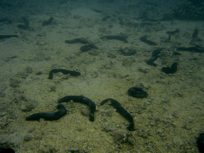 Holothuria_leucospilota